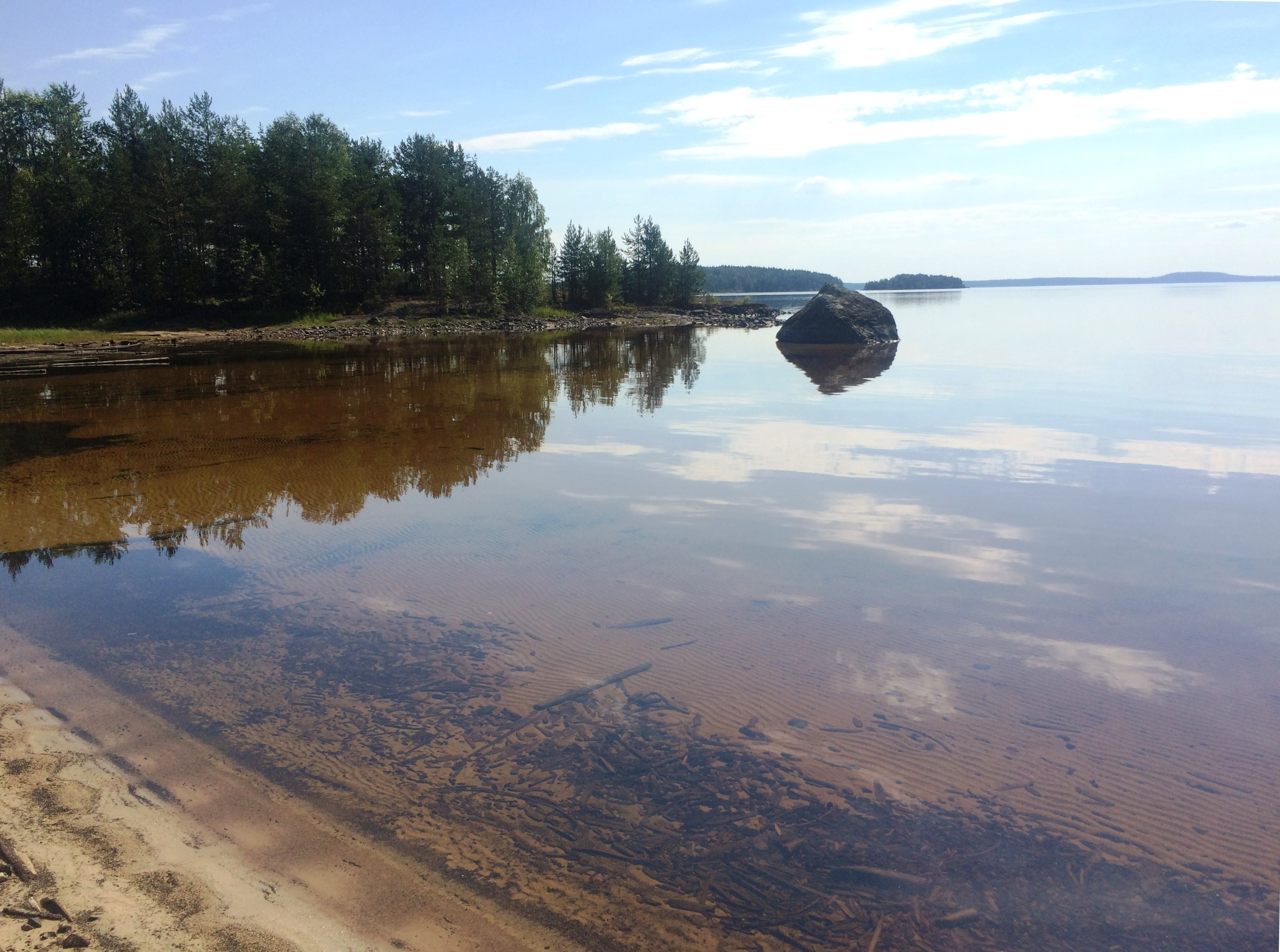 Пальеозеро